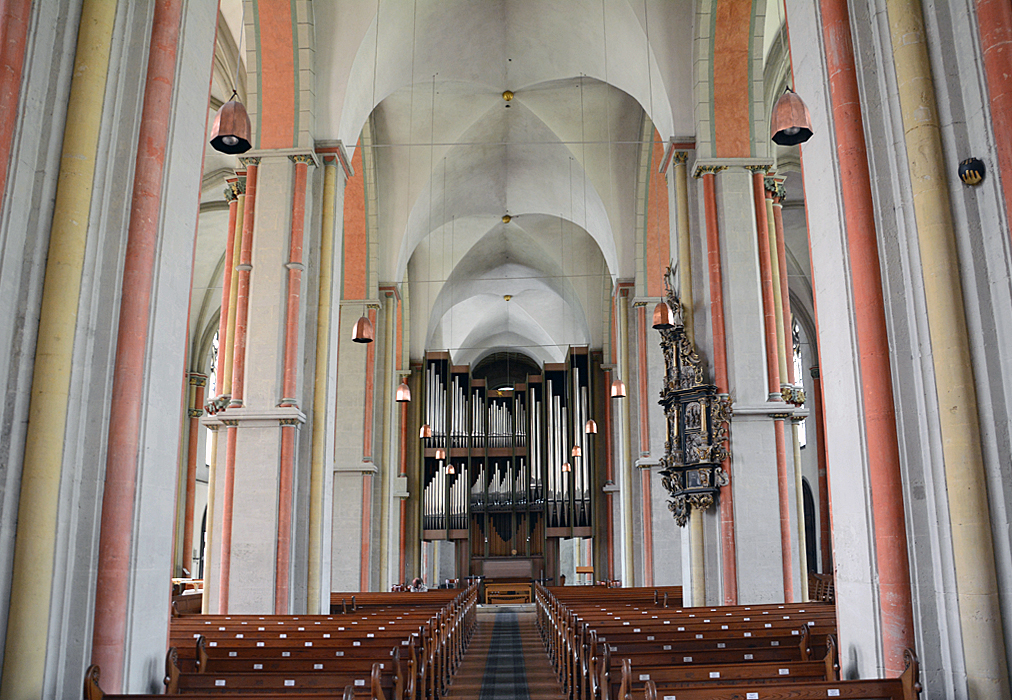 Inneres der Katharinenkirche in Braunschweig